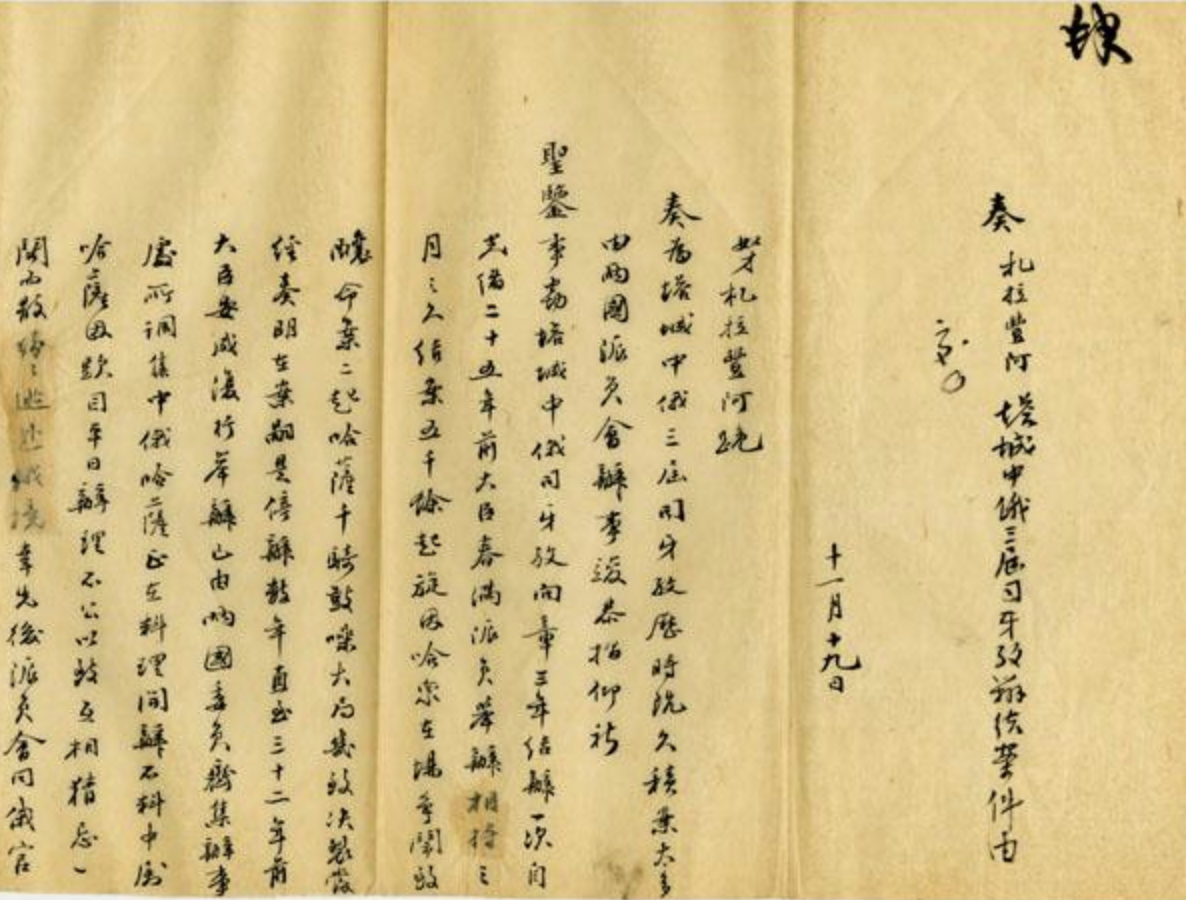 中文（中国大陆）: 《奏報塔城中俄三屆司牙孜會辦結案七千餘起》，现存國立故宮博物院圖書文獻處，出版于《數位典藏與數位學習聯合目錄》